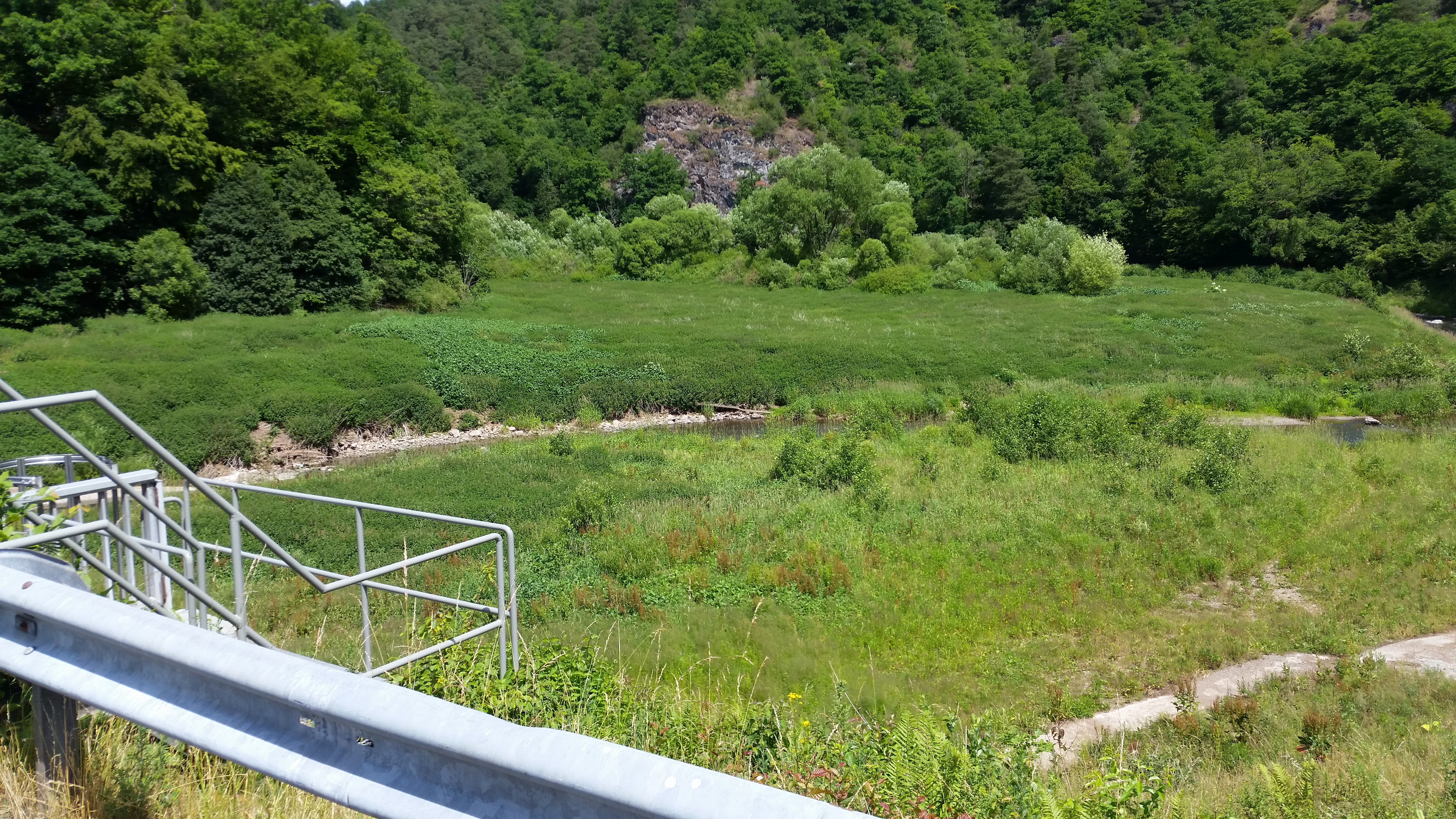 Kammerwoog